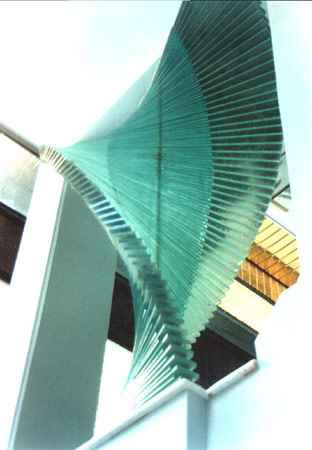 Eικόνα αρχείου μου/Glass art in Greece --Notis 11:58, 29 Ιουνίου 2006 (UTC)Notis Art Glass